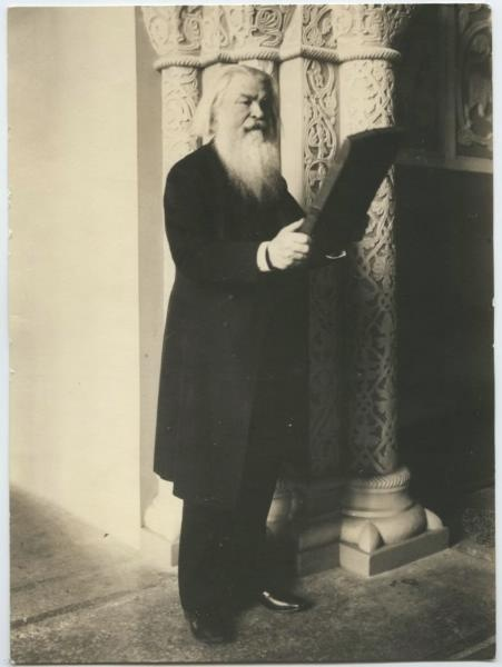 Учёный Забелин Иван Егорович (1820-1909) - директор Исторического музея в Москве. 1900г.